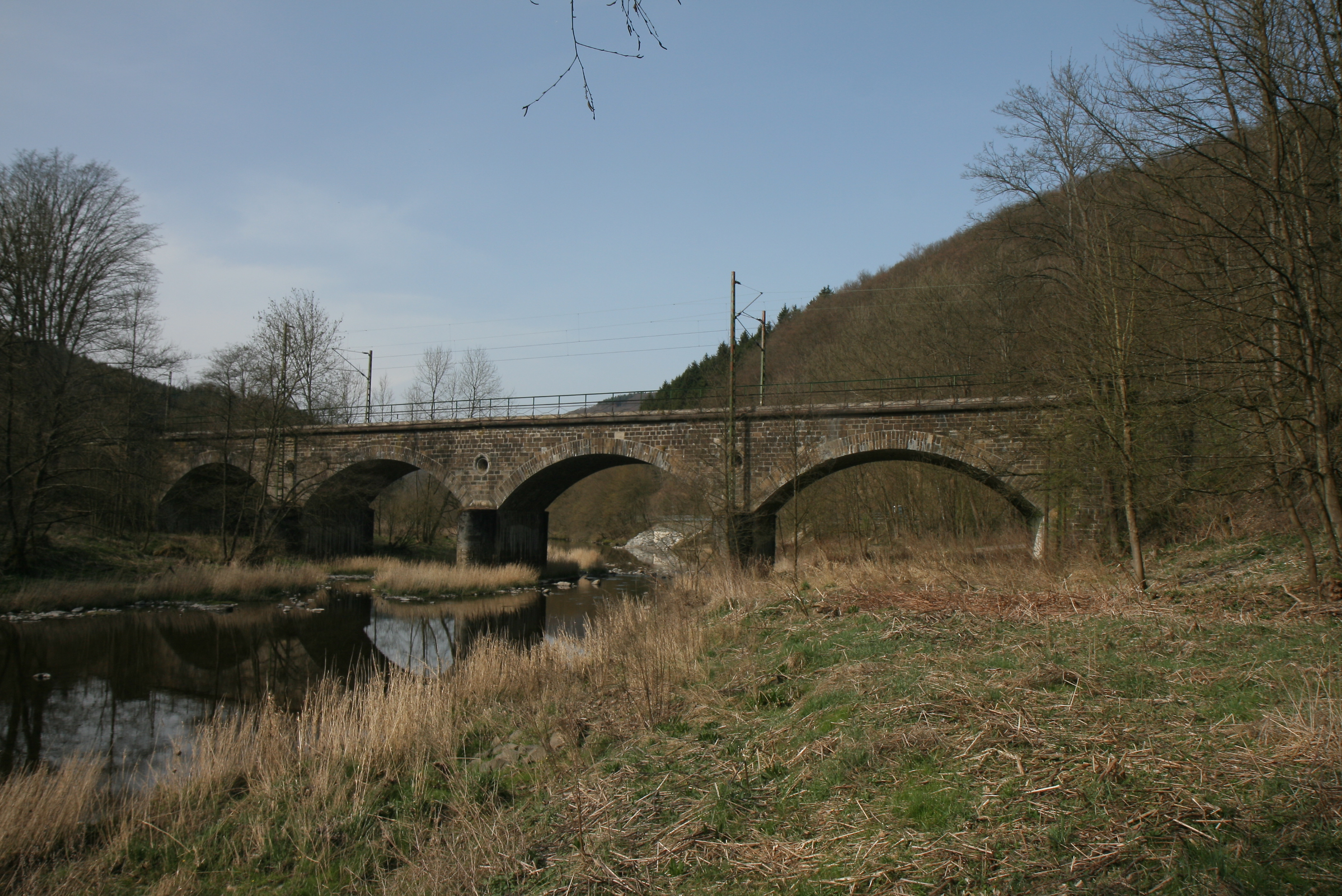 Eisenbahnbrücke über die Lenne in Plettenberg-Siesel. This image shows a heritage building in Germany, located in the North Rhine-Westphalian city Plettenberg (no. 93).